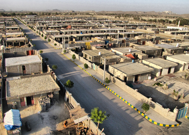 روستای کورزین